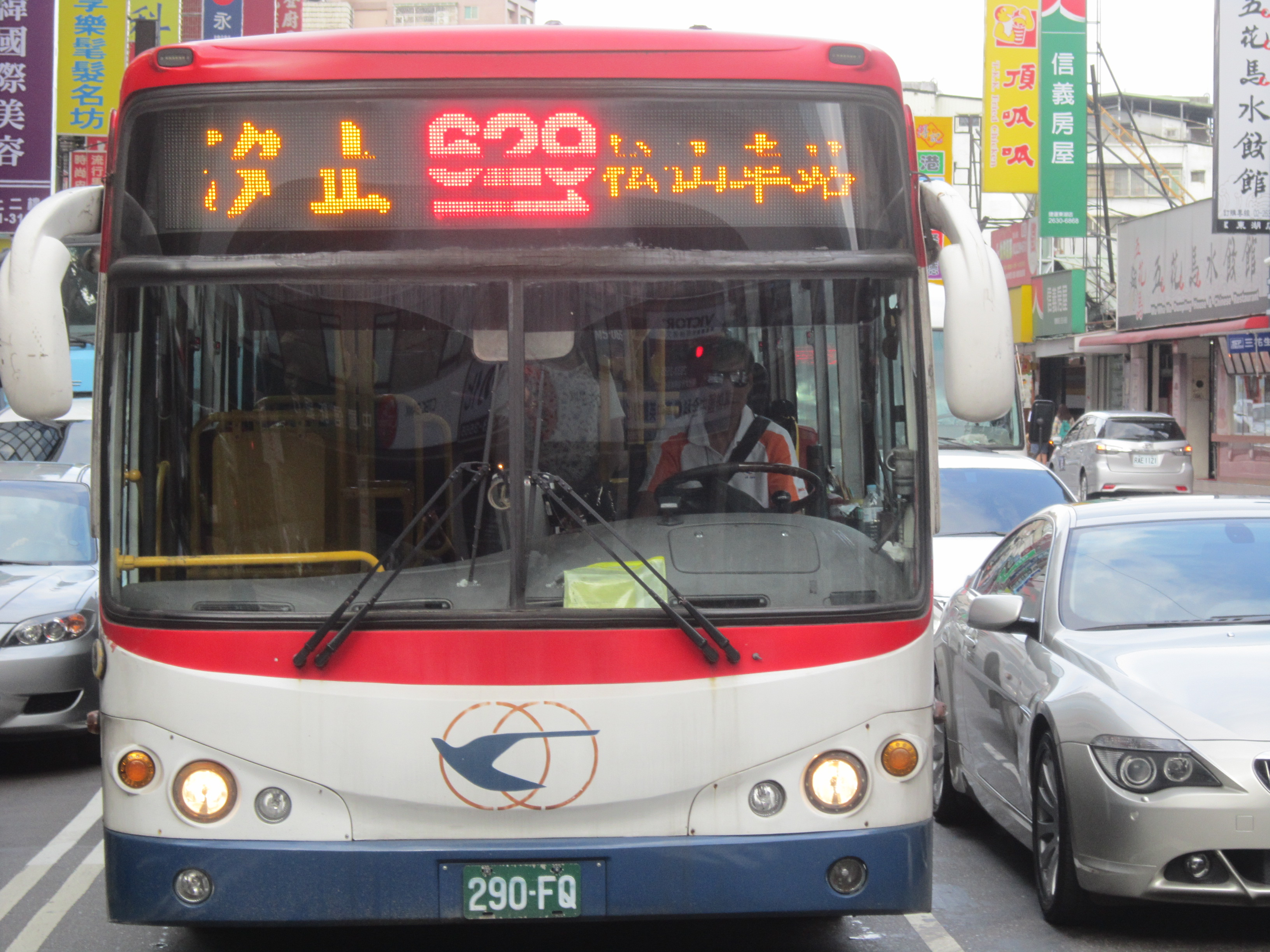 中文（台灣）: 新北客運大客車290-FQ行駛新北市區公車629線，車頭外觀。駕駛員身著中興巴士集團制服。